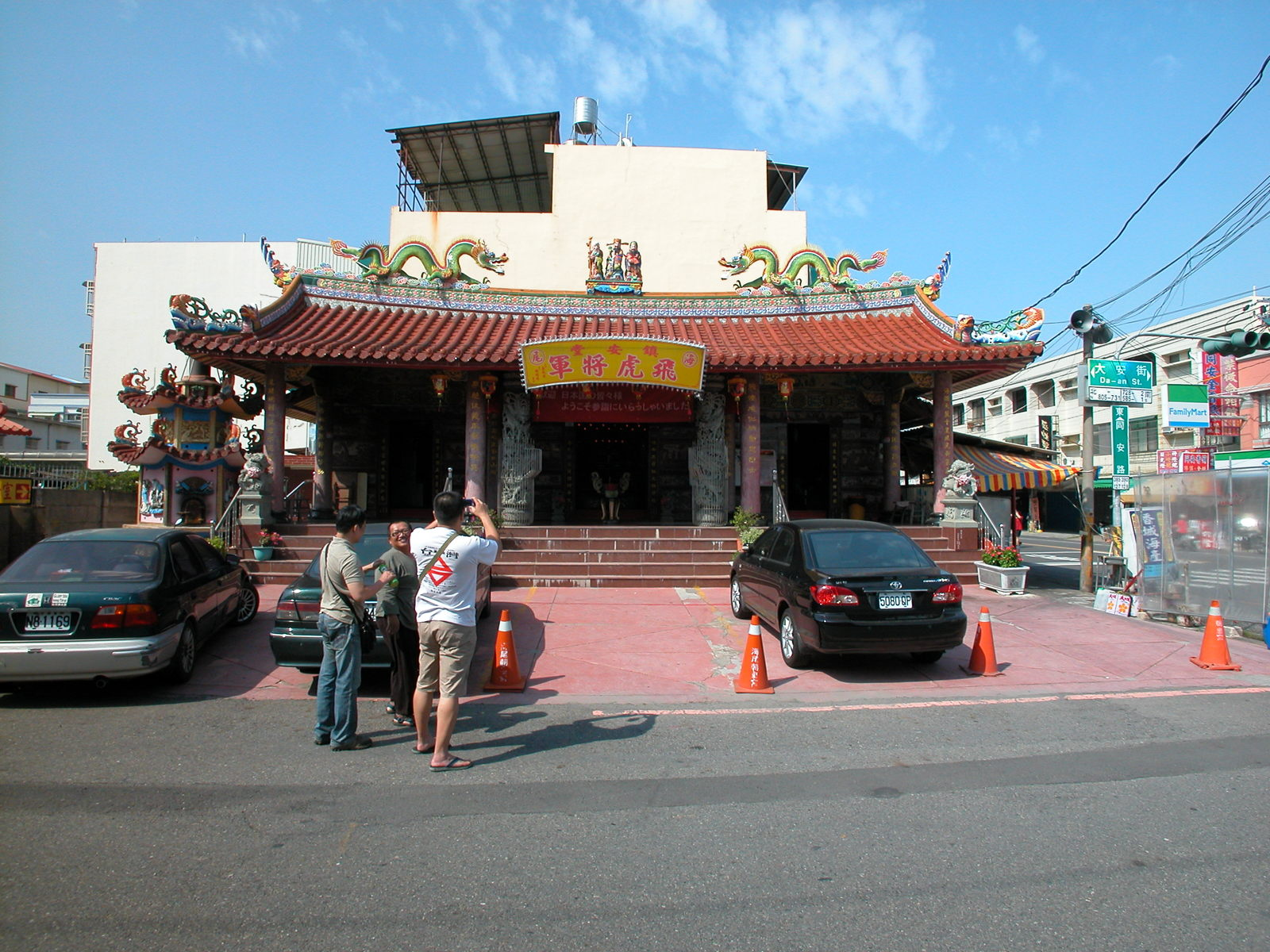 鎮安堂飛虎將軍廟